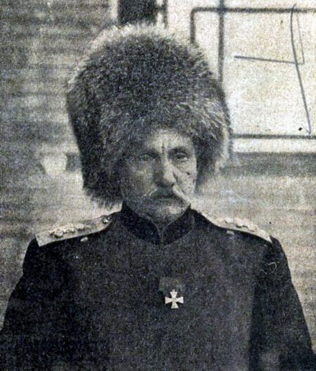 Павло Іванович Міщенко в польовій формі перед наскоком на місто Інкоу під час російсько-японської війни